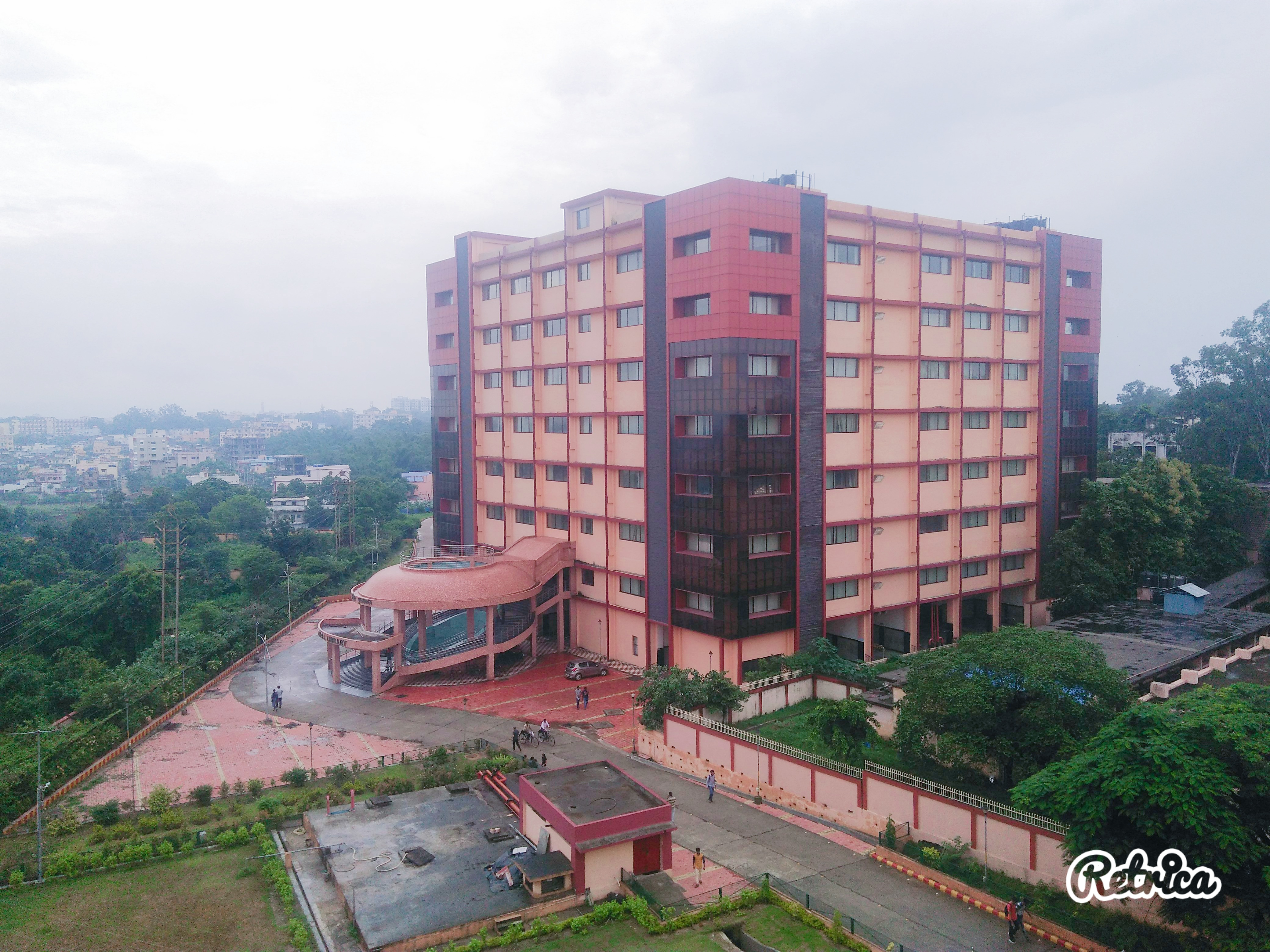 Central library of IIT Dhanbad as seen from Jasper hostel